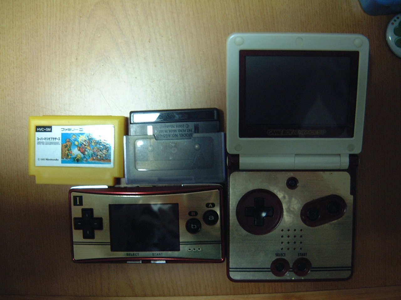 投稿者所有物